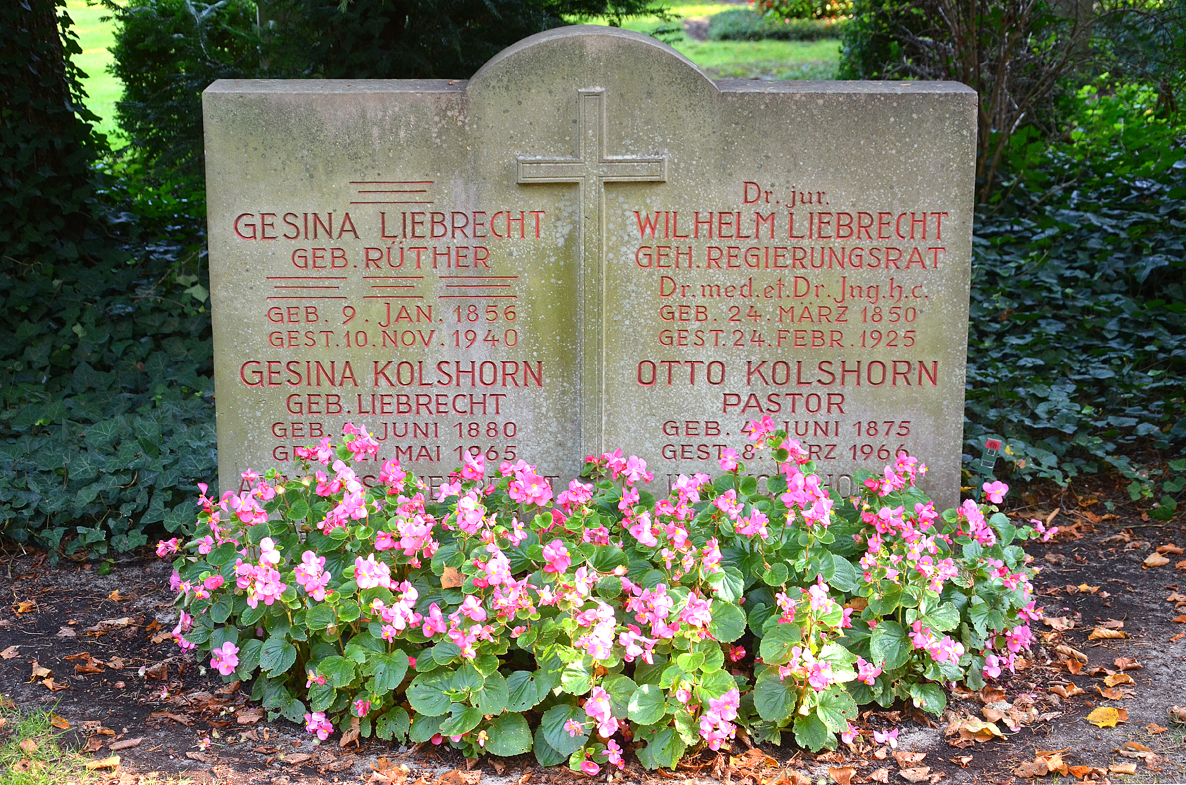 Nach Vorlage der Geschäftsordnungskommission des Rates der niedersächsischen Landeshauptstadt Hannover wurde laut einstimmigen Beschluss verschiedener Gremien (Drucksache Nr. 2441/2006) wie dem Kulturausschuss, dem Ausschuss für Umweltschutz und Grünflächen sowie dem Verwaltungsausschuss jeweils einstimmig beschlossen, das (Familien-)Grabmal des Regierungsrats Dr. jur., Dr. med. und Dr.-Ing. hc Wilhelm Liebrecht auf dem Stadtfriedhof Engesohde in die städtische Ehrengrabpflege aufzunehmen ...